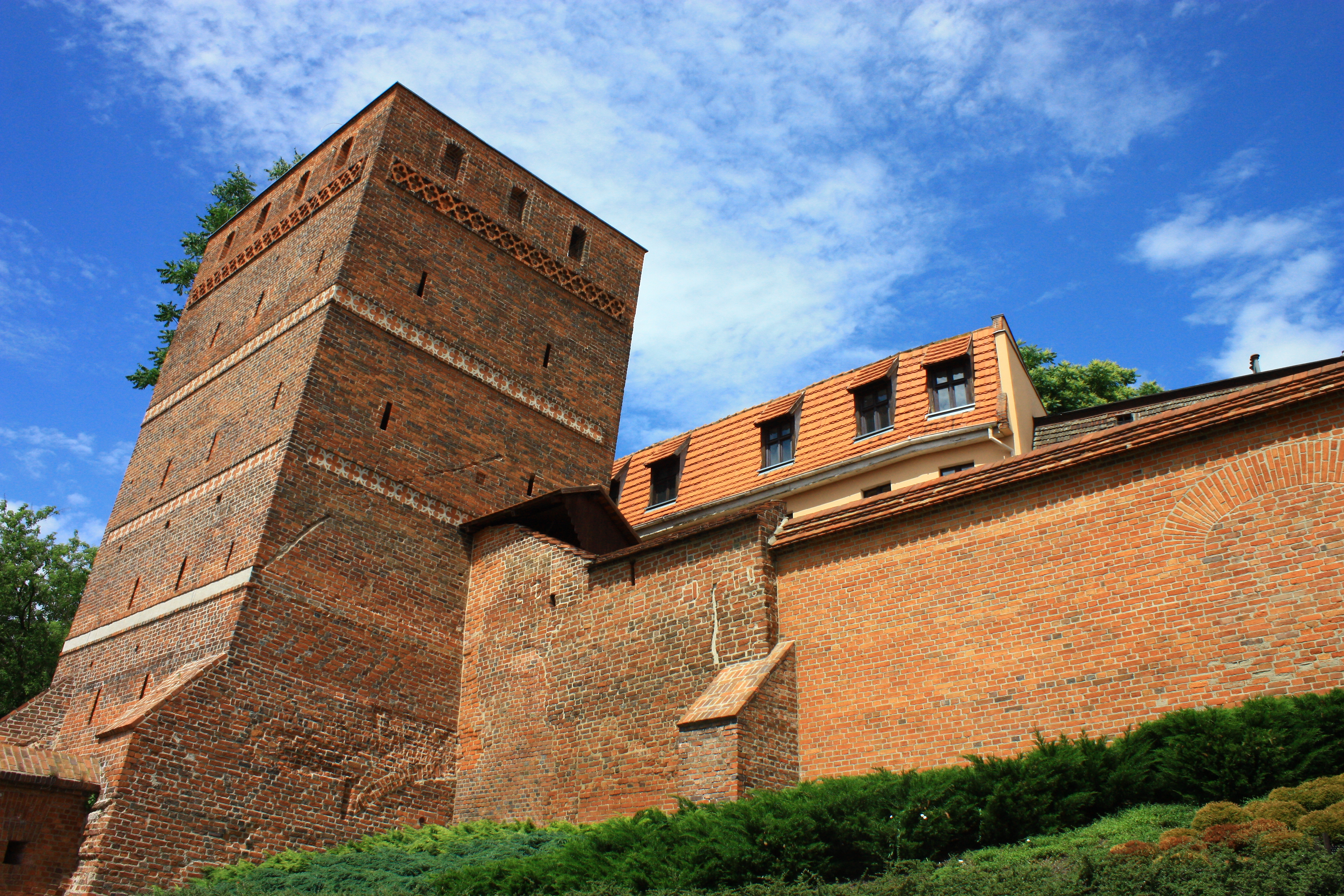 Toruń, Krzywa Wieża, XIV